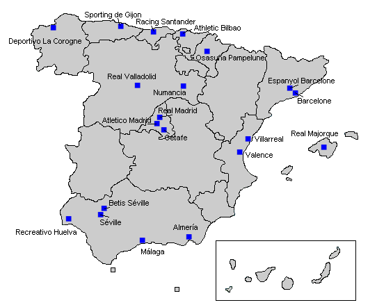 Localisation des équipes participant à la Liga 2008-2009